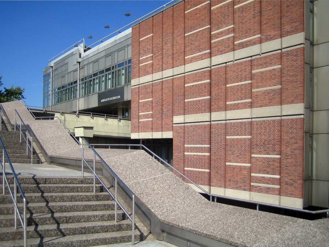 "Kulturforum Berlin", Arts and Craft Museum.